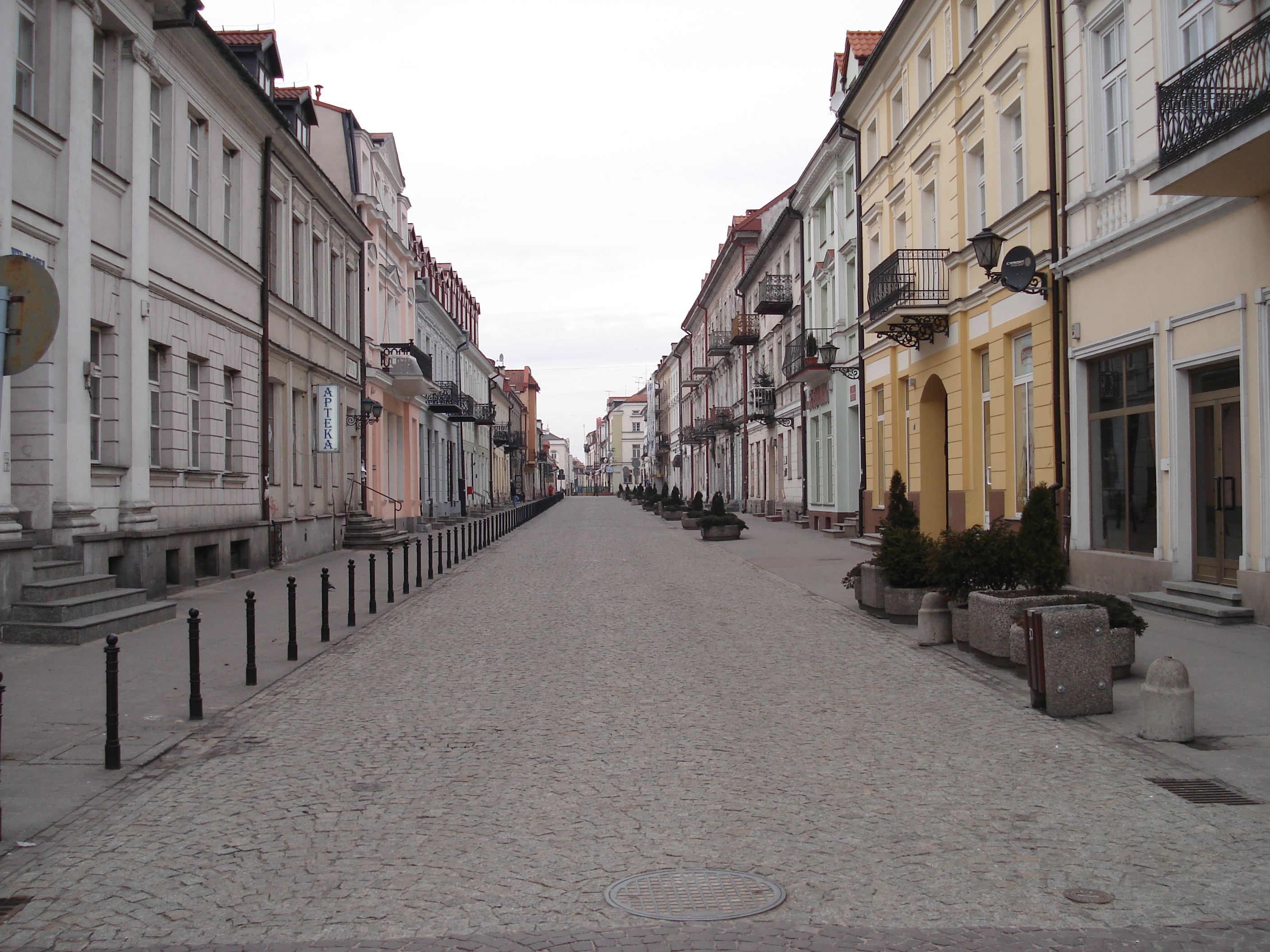 Ulica Grodzka w Płocku.